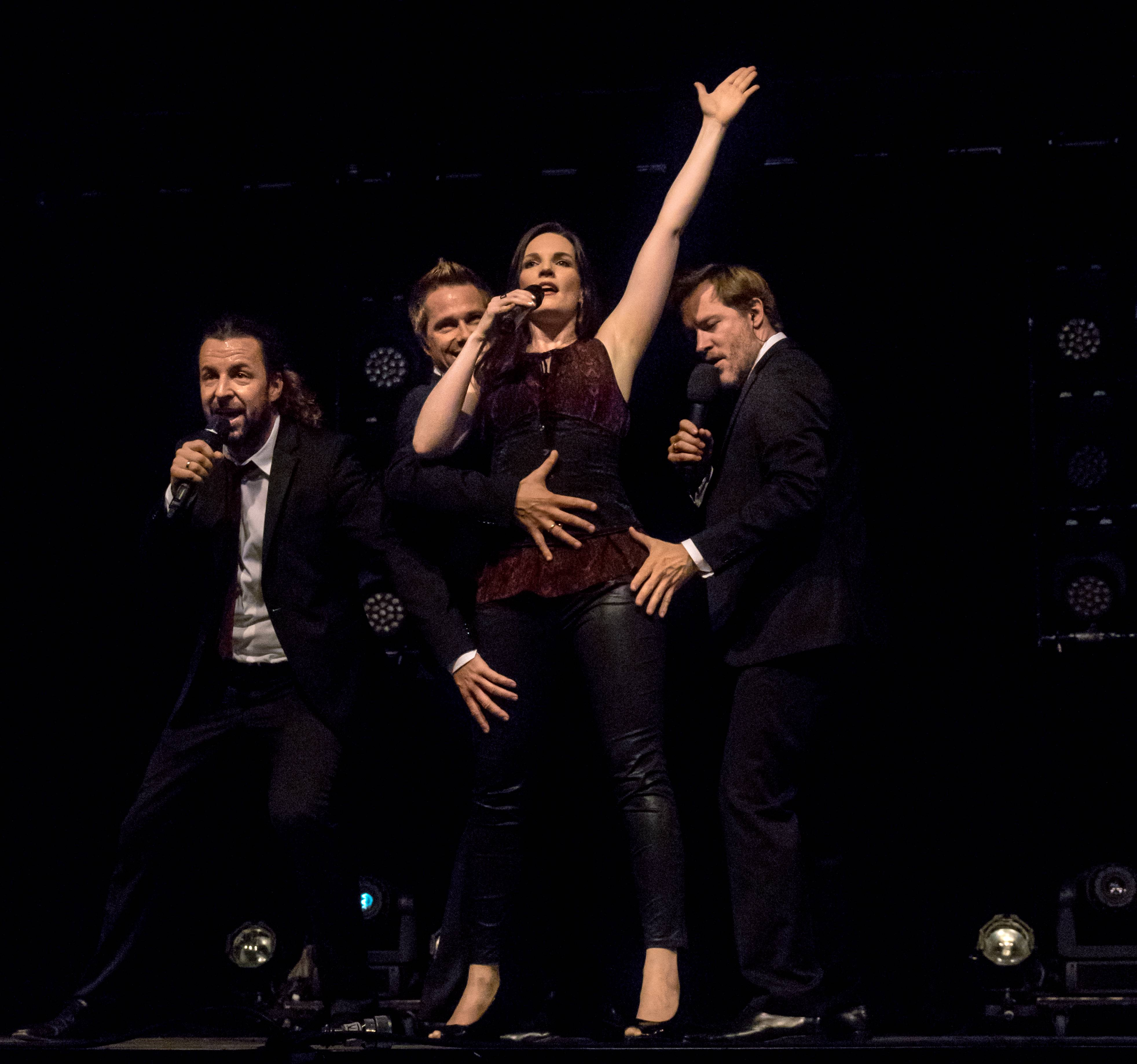 Bilder vom ZMF 2015,die Gala FORK am 15. Juli 2015